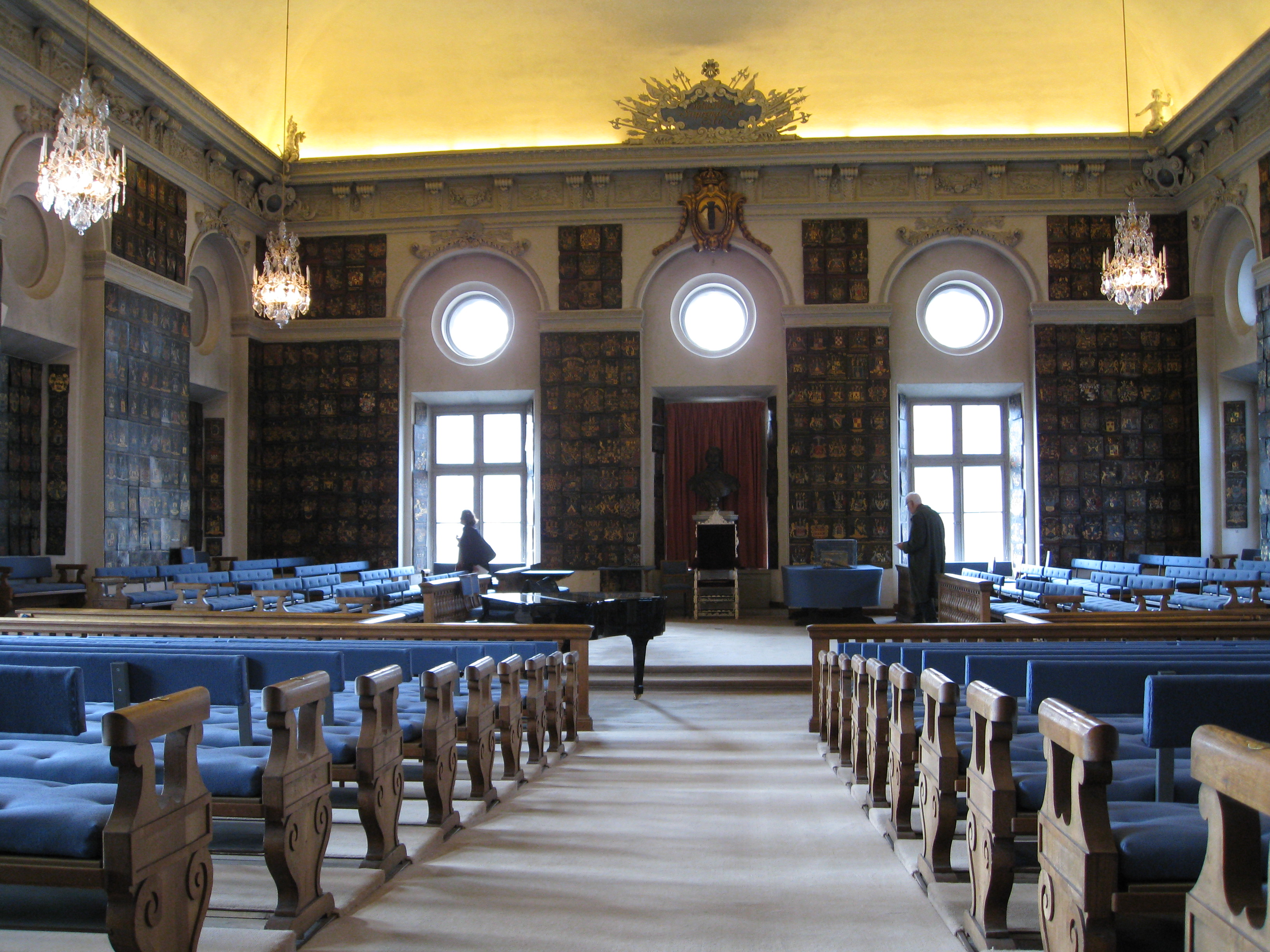 Interiörbild i Riddarhuset